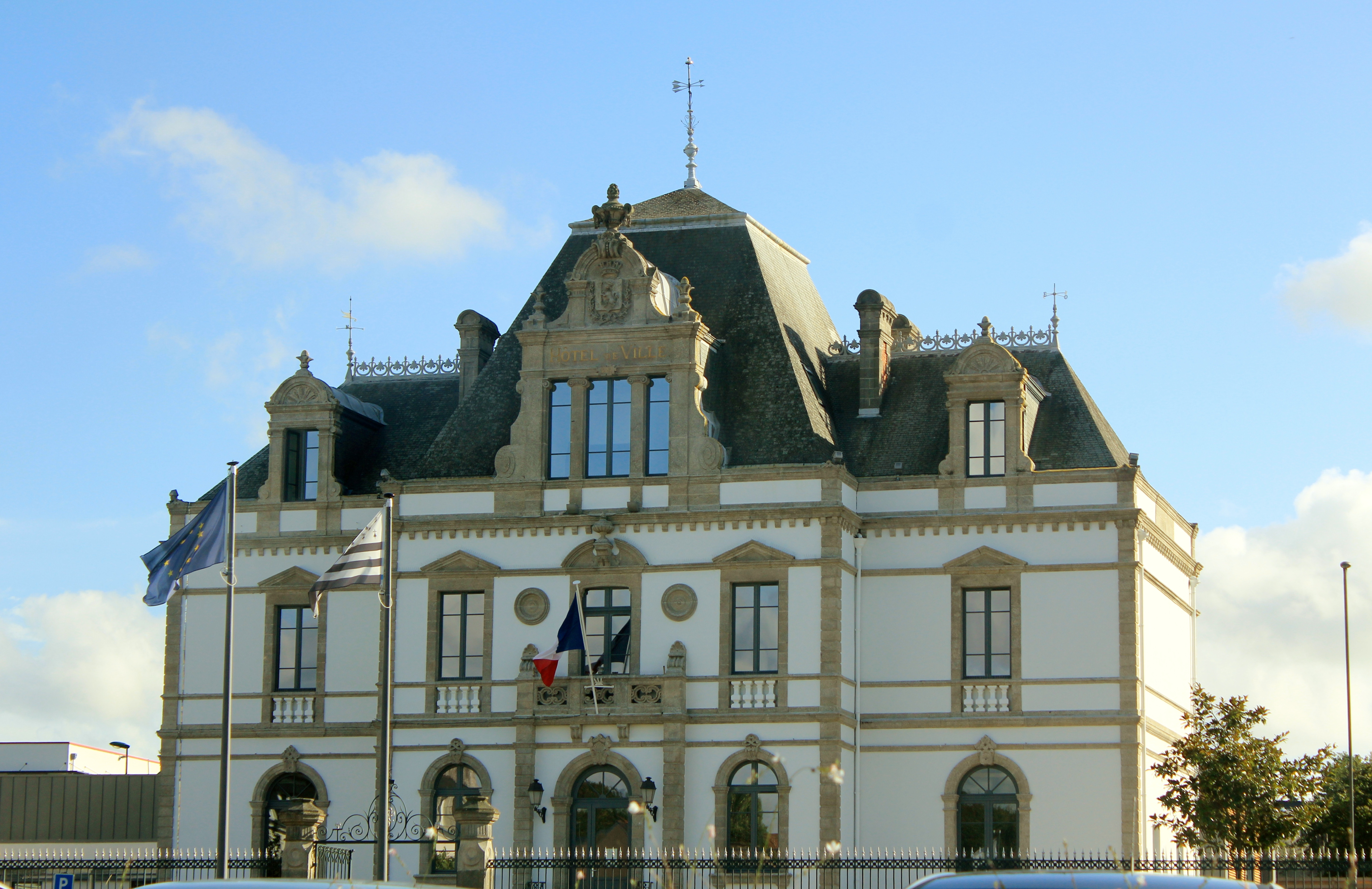 Mairie de Ploërmel